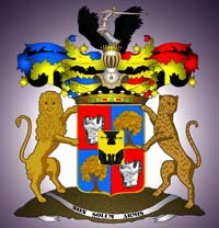 Герб рода графов Румянцевых